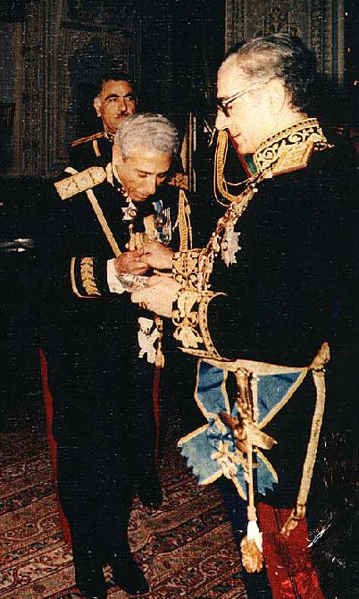 علی نشاط در حال بوسیدن دست محمدرضا پهلوی